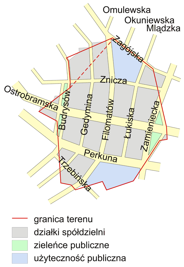 Górki Grochowskie, międzywojenna Oficerska Spółdzielnia Mieszkaniowa Grochów, planowana zabudowa - plan.